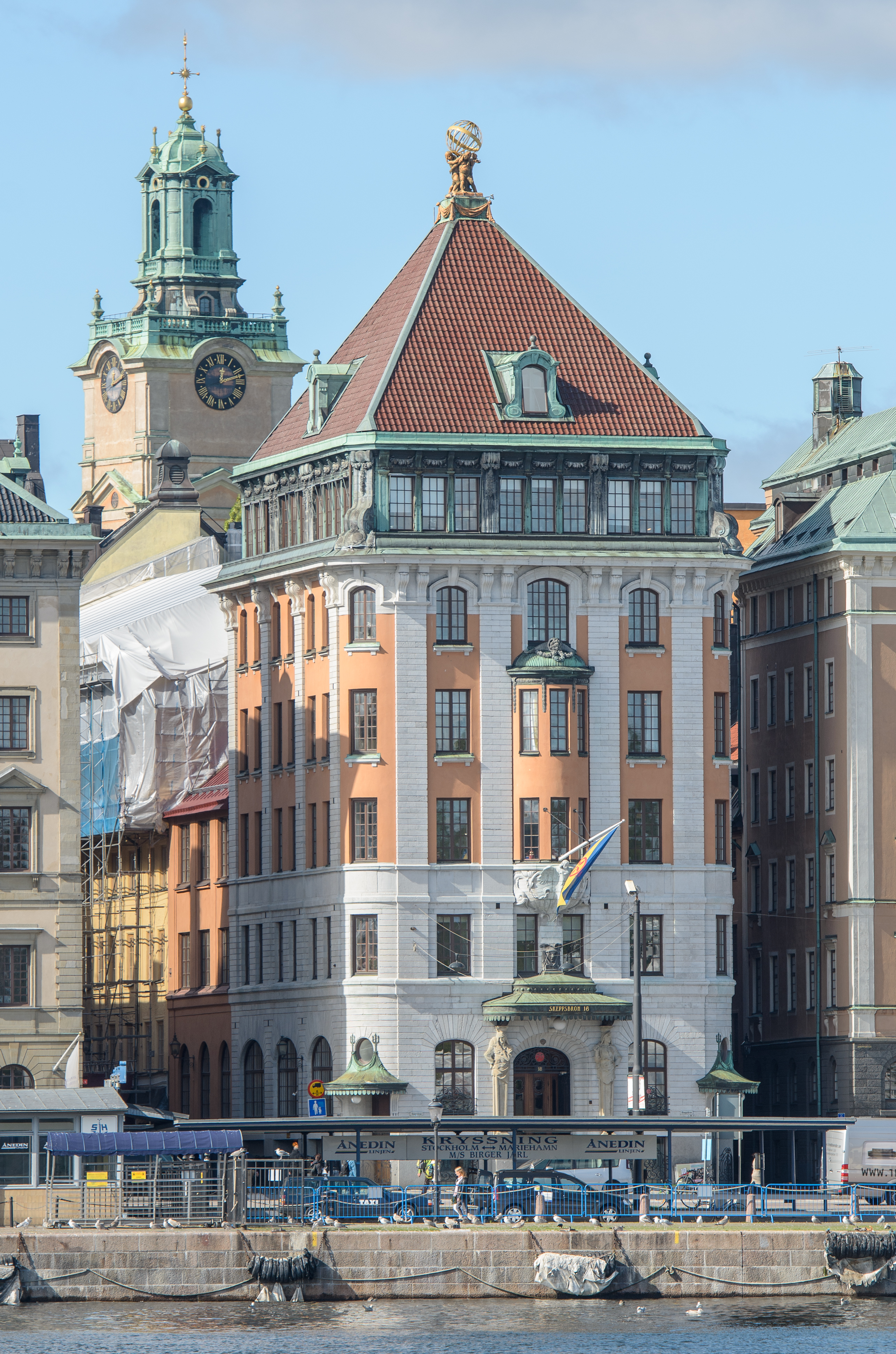 Skeppsbron 18, seen from Skeppsholmen. Built 1909-10. HQ for Kinnevik.